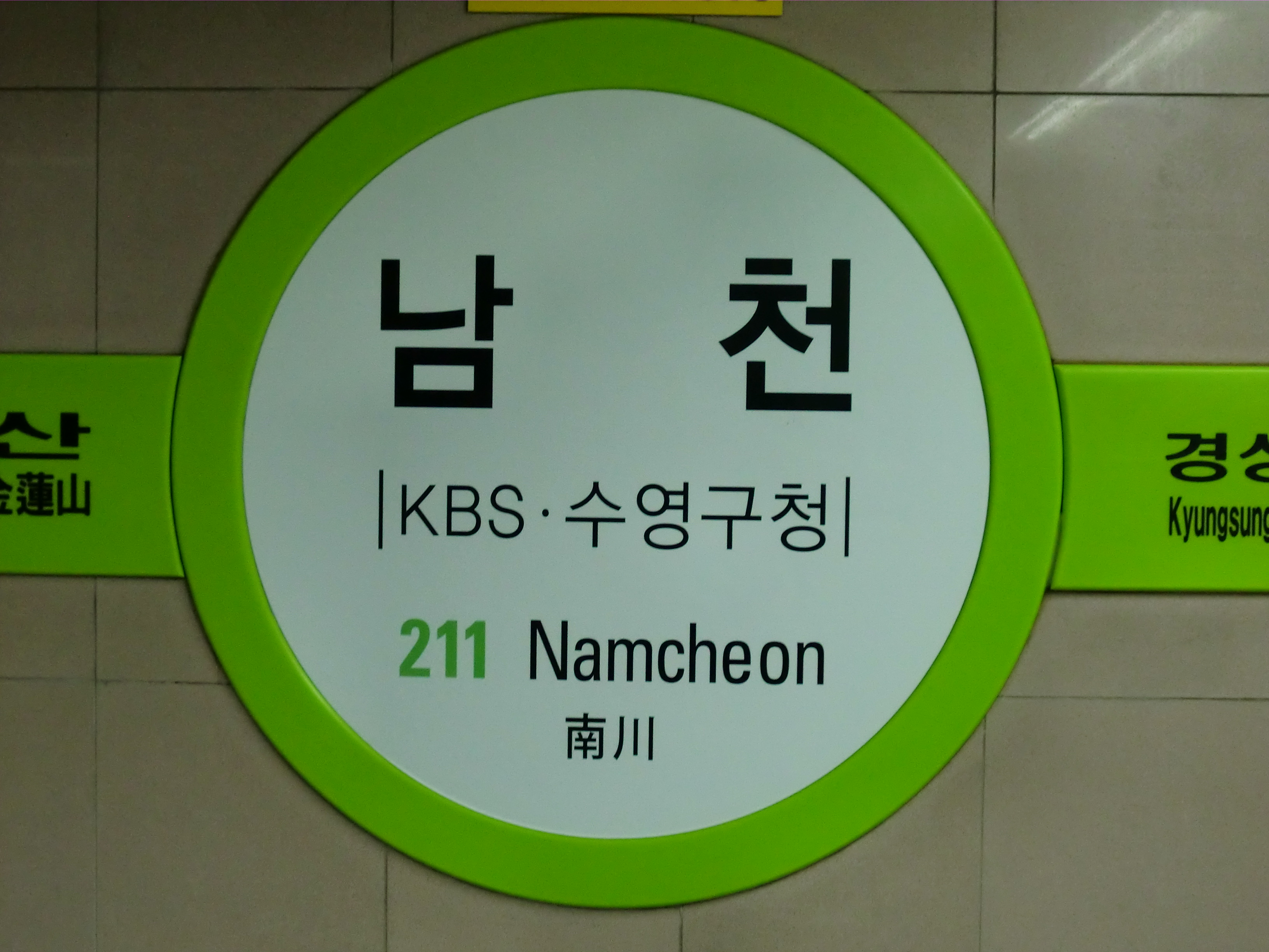 부산도시철도2호선 남천역의 역명판